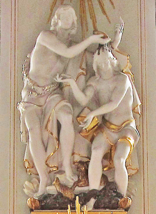 Täufergruppe aus dem Jahr 1934 in der Basilika St. Johann in Saarbrücken, Saarland von Bildhauer Arnold Hensler (* 23. Juli 1891 in Wiesbaden; † 10. Mai 1935 in Trier).